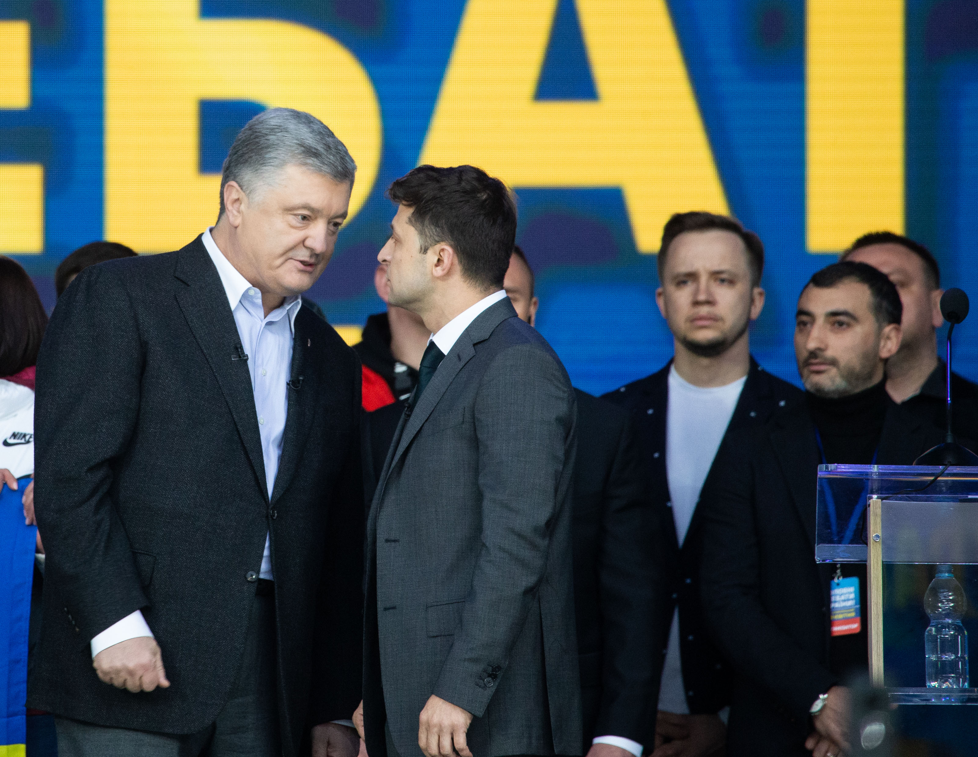 Дебаты кандидатов на пост Президента Украины Петра Порошенко и Владимира Зеленского